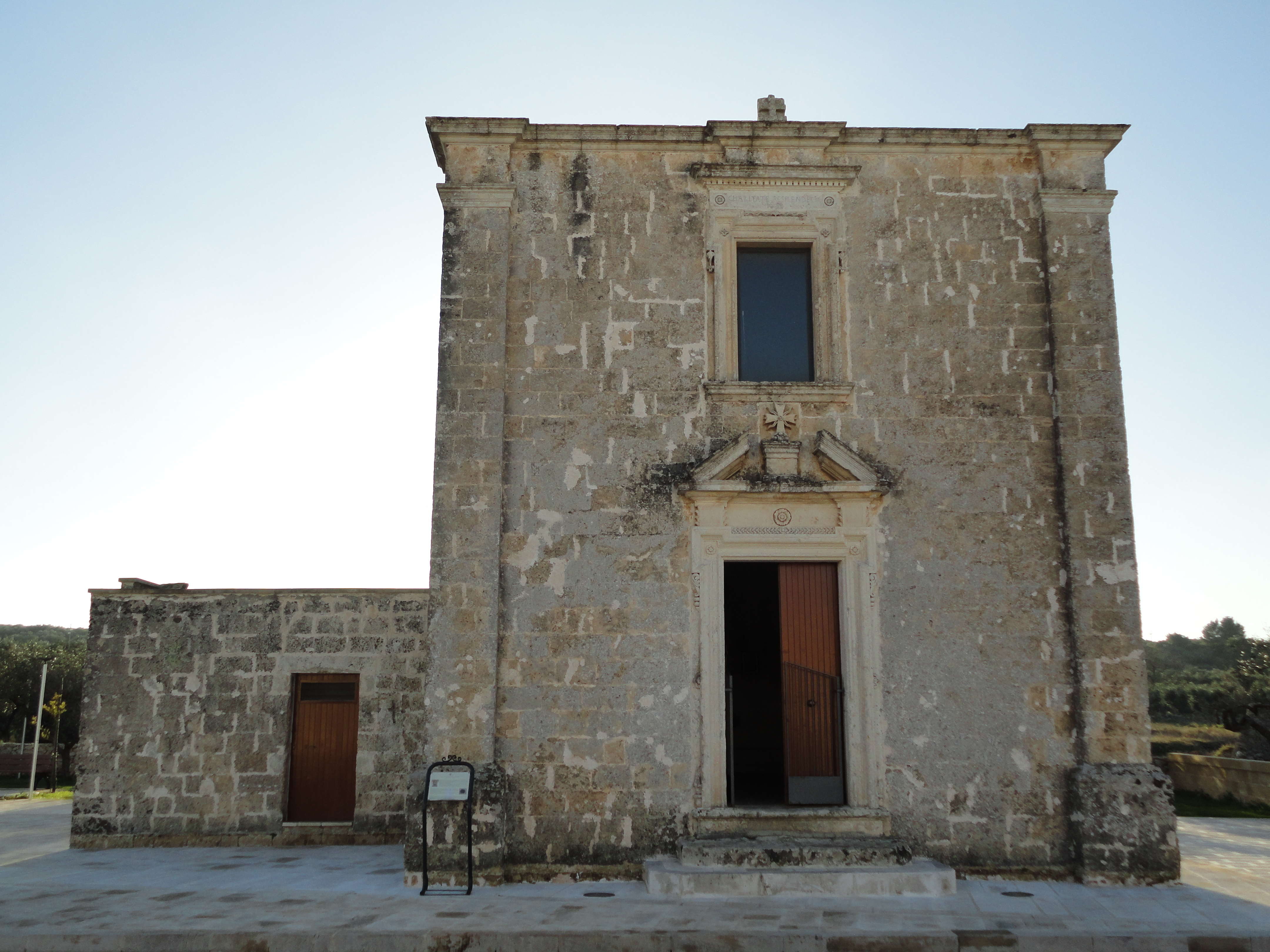 Chiesa del Mantovano Martignano, Lecce